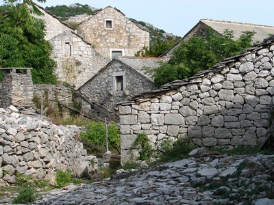 Village archéologique de Nakovanj